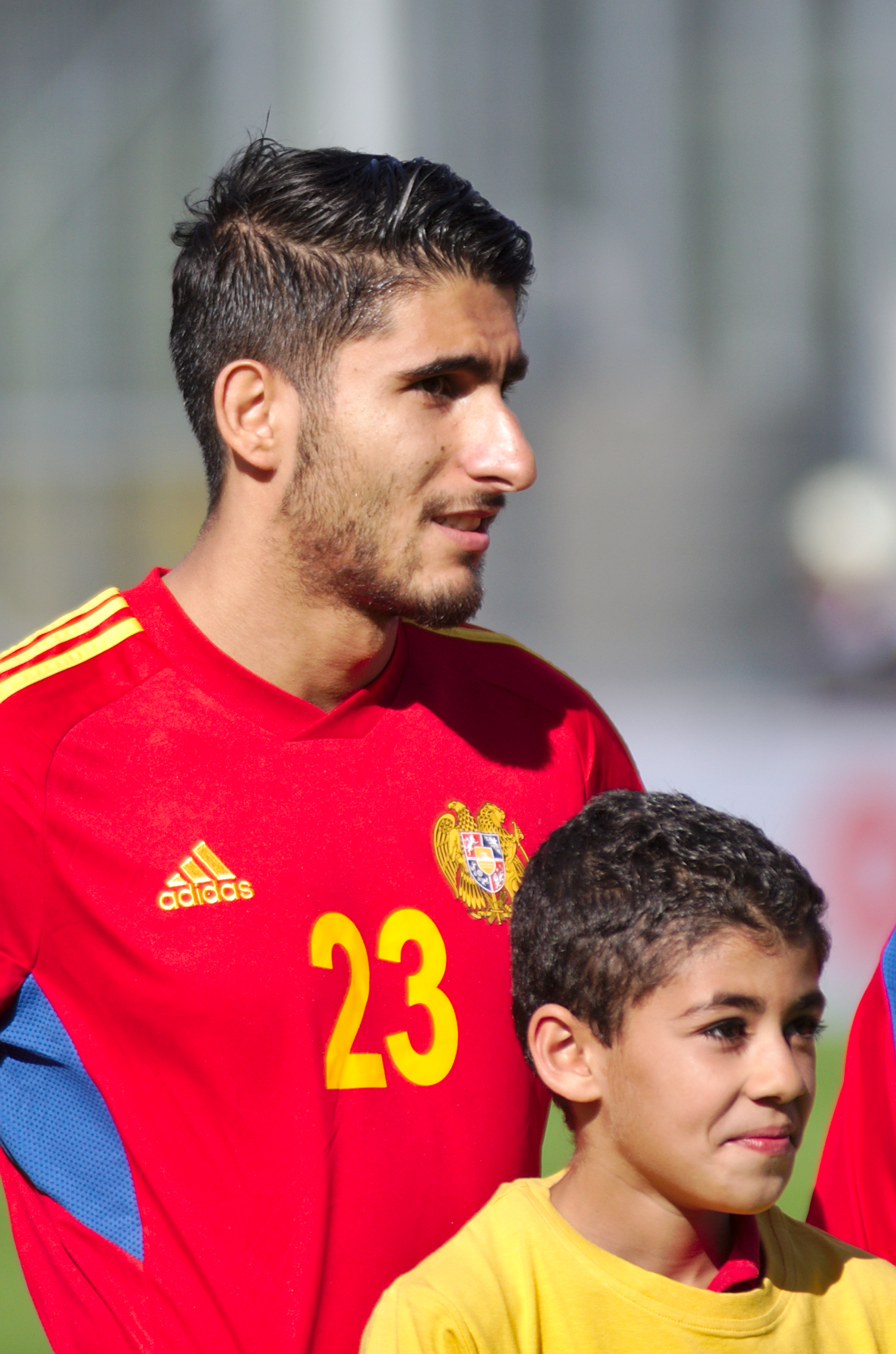 Algérie - Arménie - 20140531 - Aras Ozbiliz